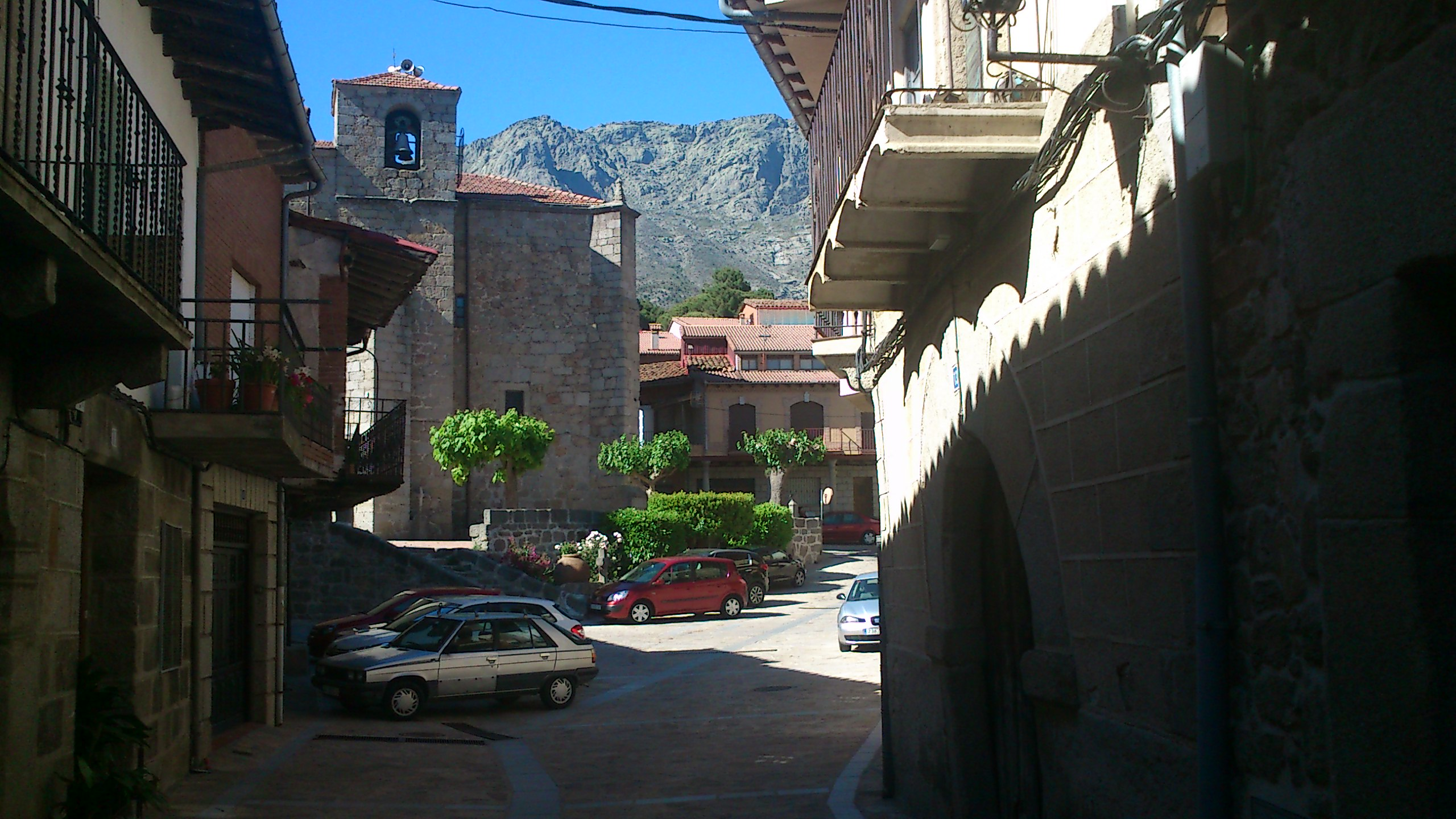 Arquitectura